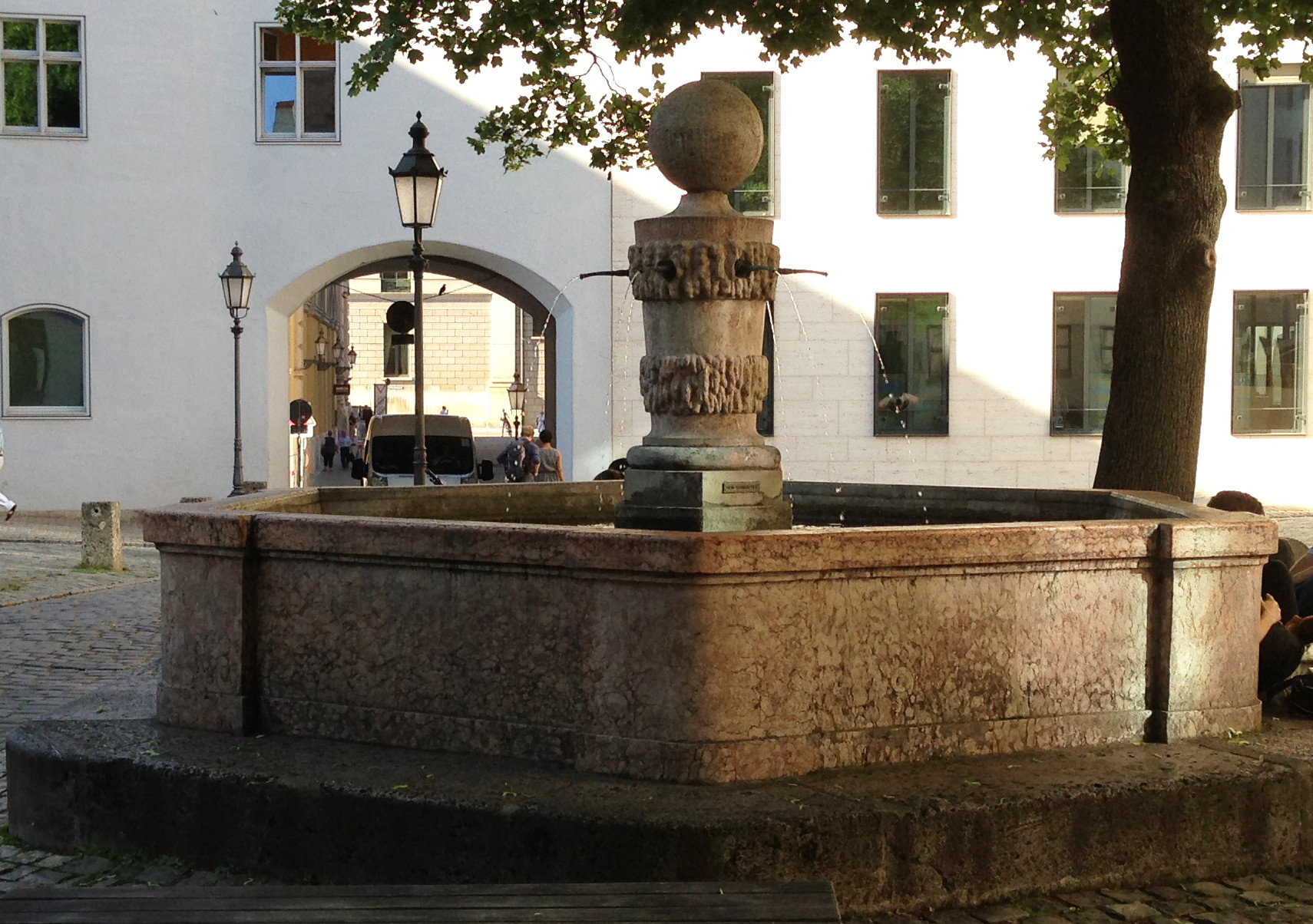 Brunnen Alter Hof, München, klassizistisch, bez. 1785; in der Hofmitte. This is a photograph of an architectural monument.